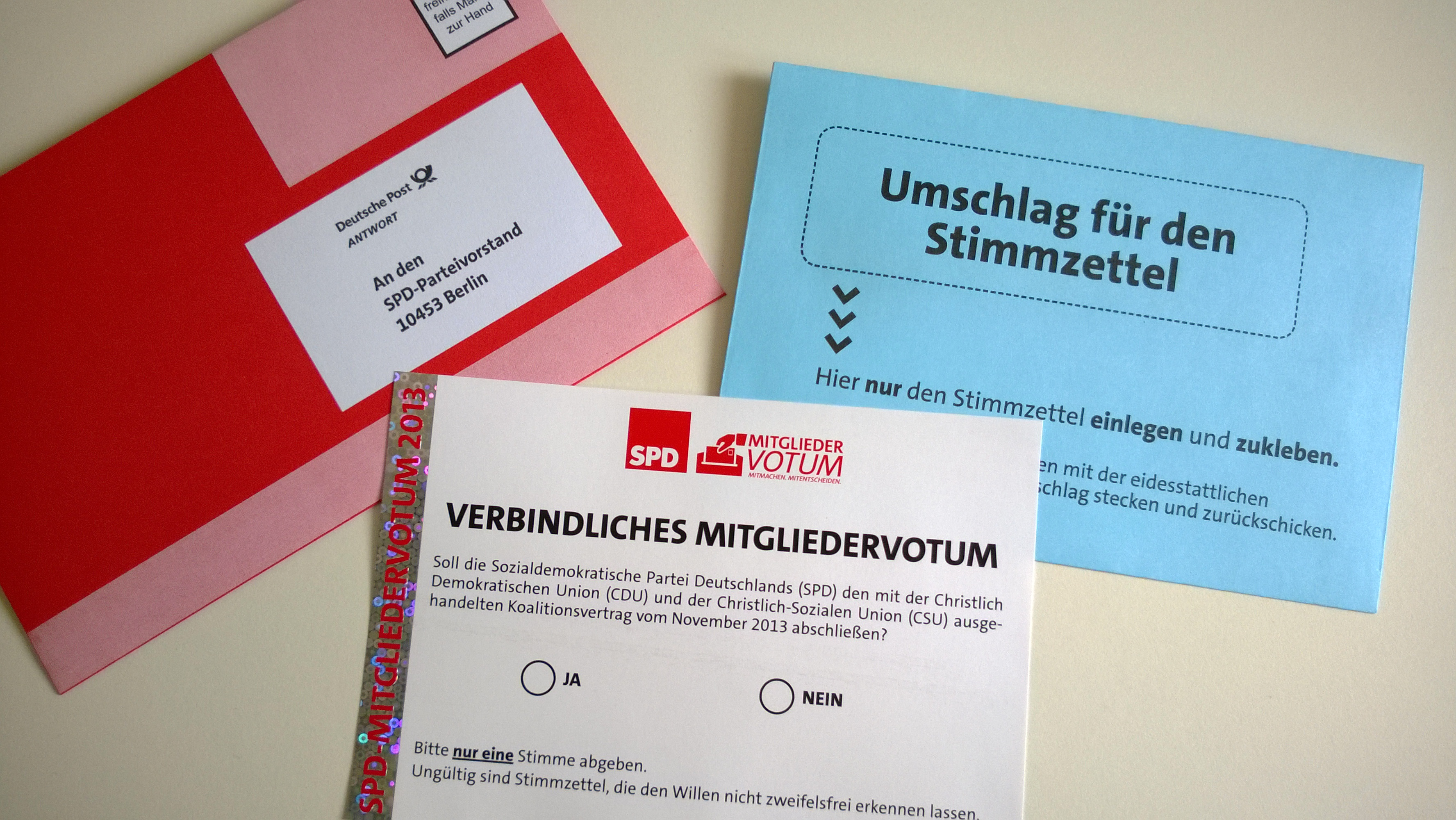 Abstimmungszettel zum SPD-Mitgliedervotum über den Koalitionsvertrag zwischen CDU, CSU und SPD